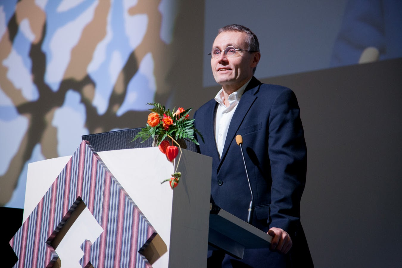 Eesti Rahva Muuseumi direktor Tõnis Lukas 2016. aasta teaduskommunikatsiooni konverentsil.